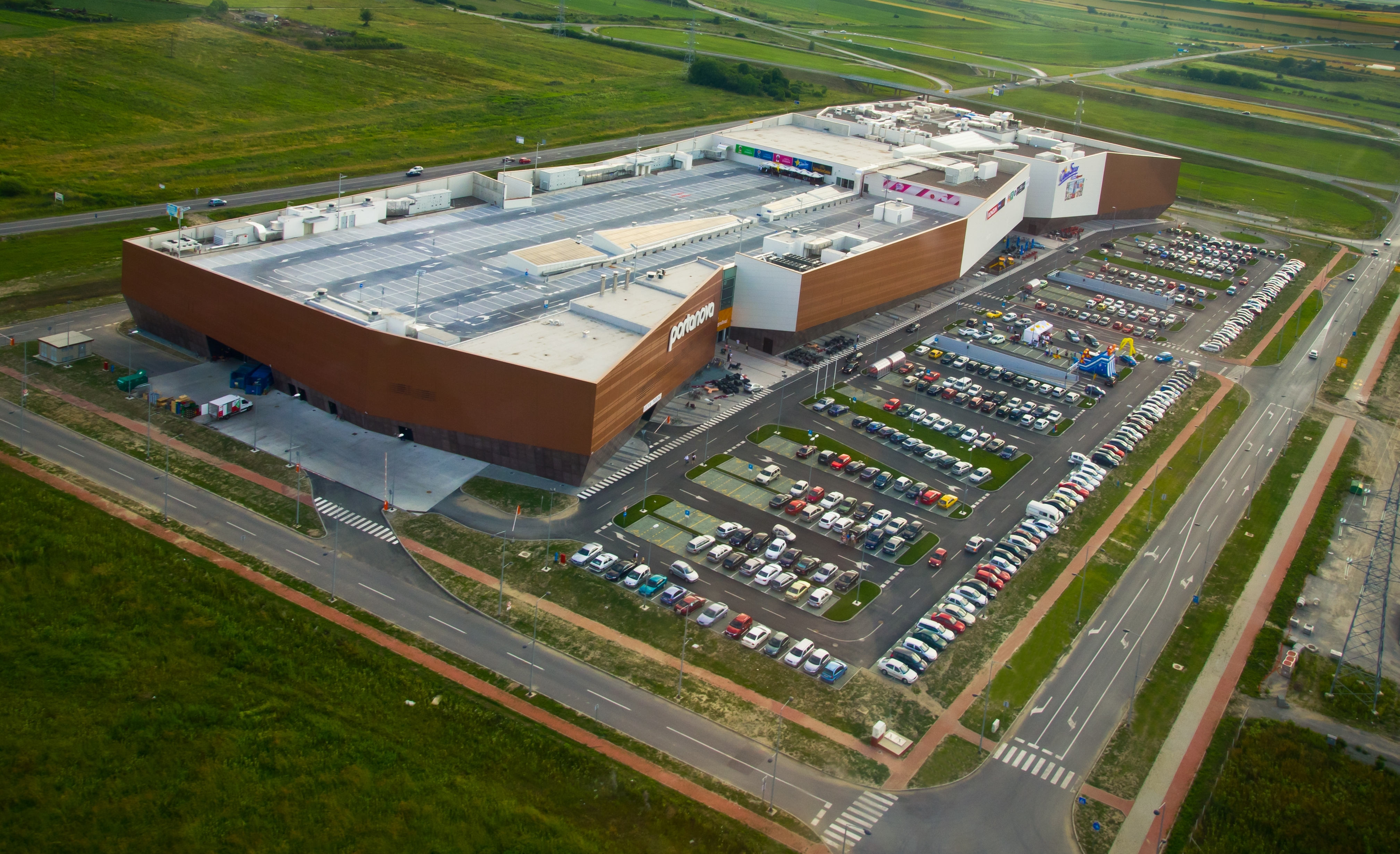 Panoramski pogled na Portanovu